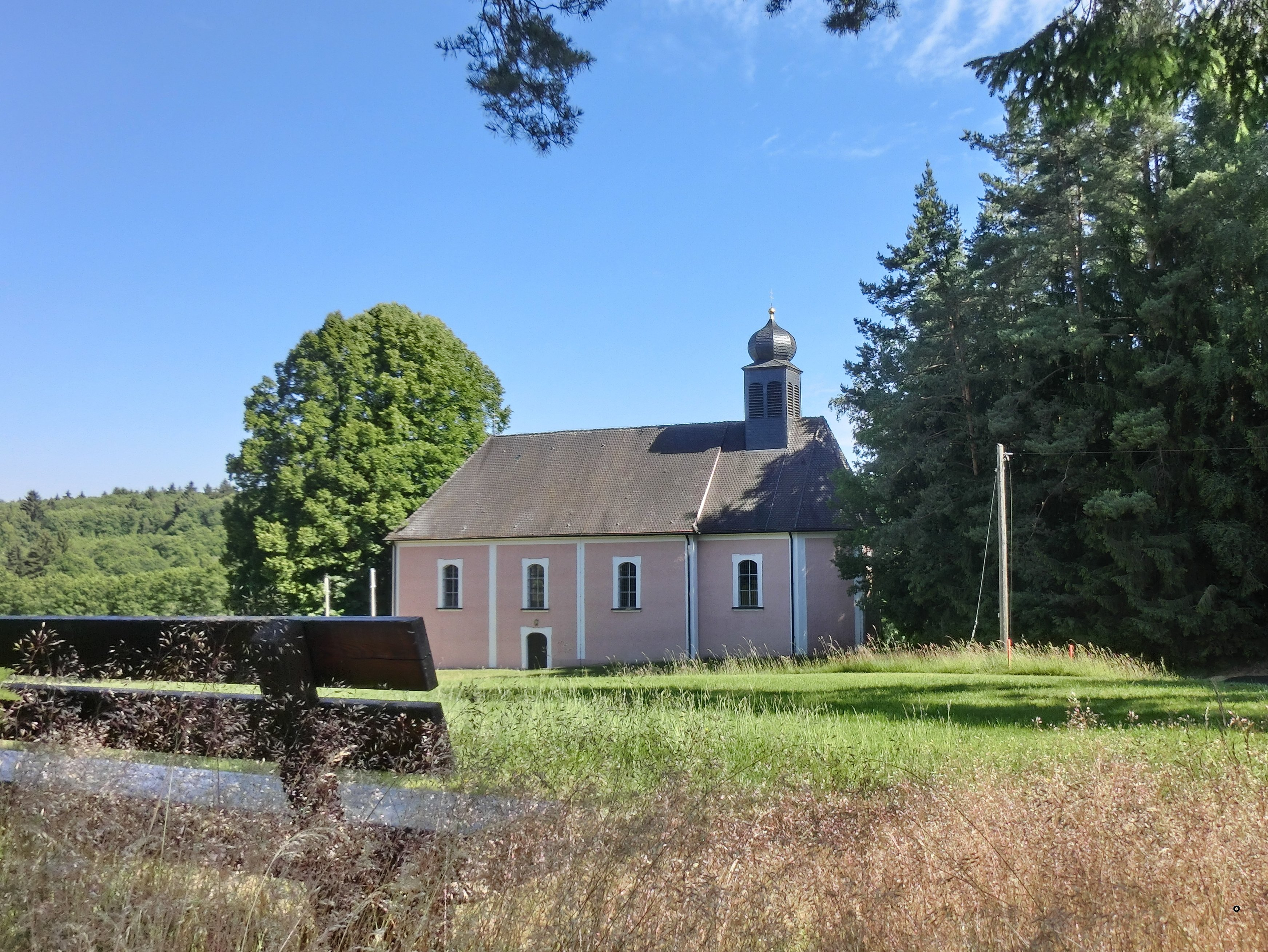 Wallfahrtskirche St. Laurentius in Weißenbrunn